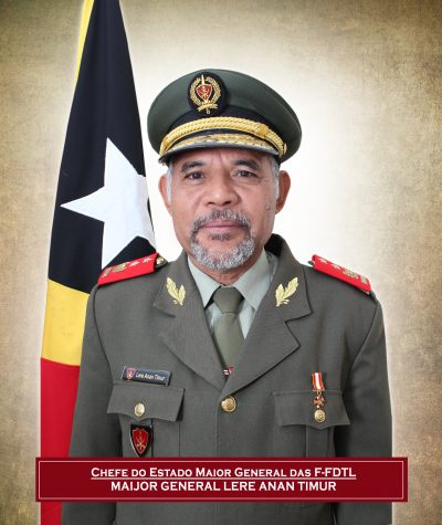 Generalmajor Lere Anan Timor